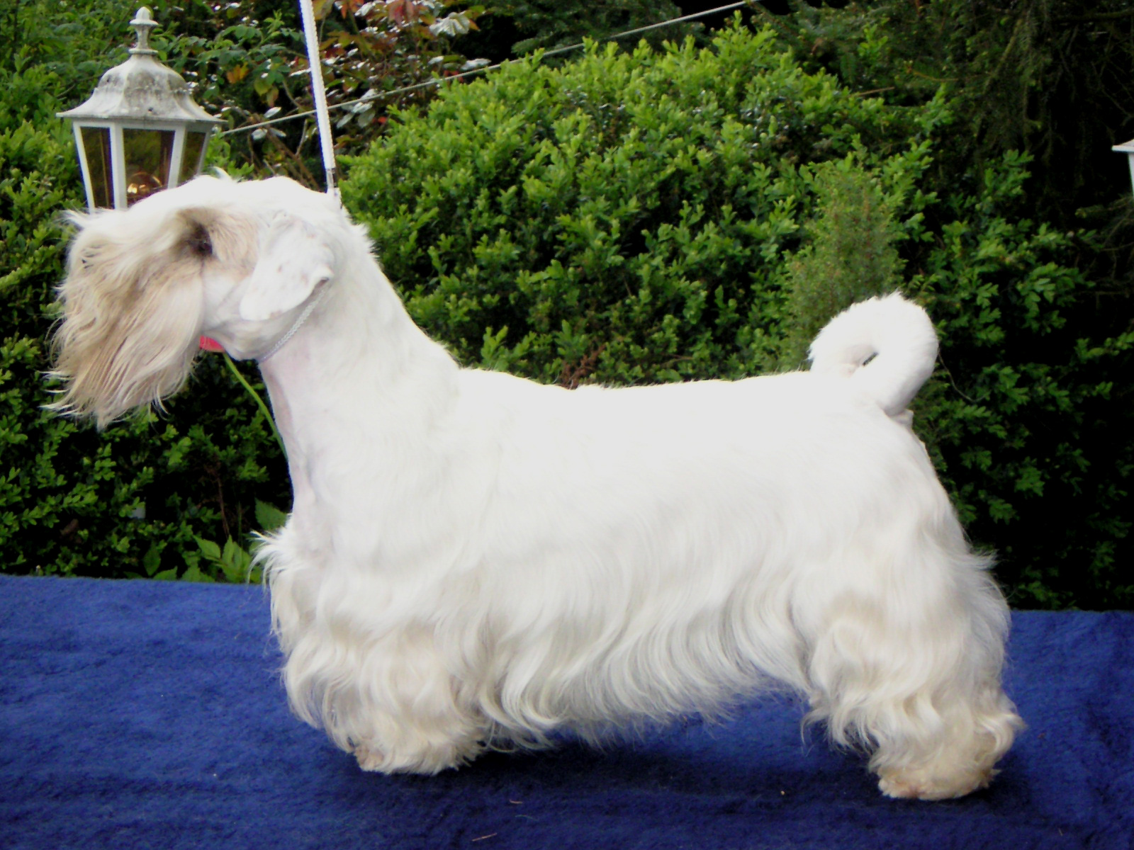 Sealyham Terrier Hündin Alice von der Löwenburg